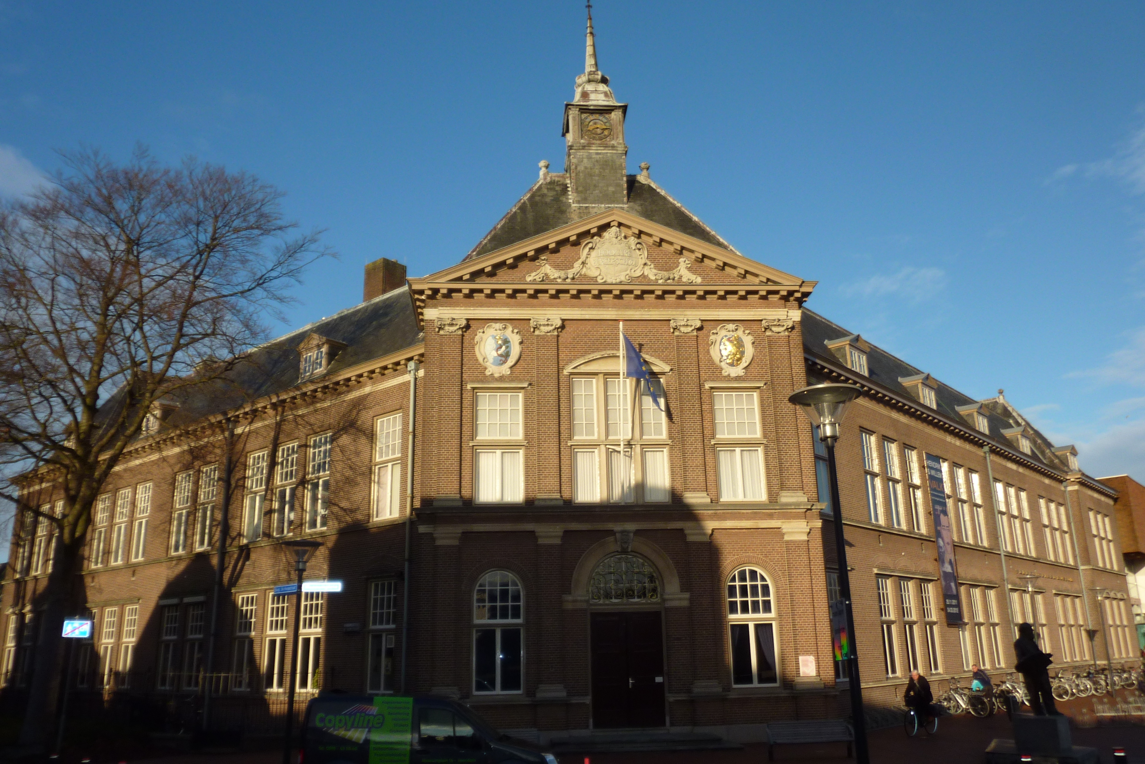 Veendam: Veenkoloniaal Museum, v/h Rijks HBS